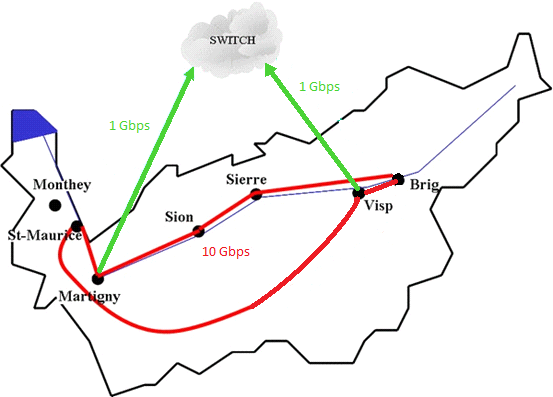 Plan épine dorsal 10 G VSnet